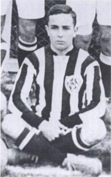 Benjamin de Almeida Sodré, o Mimi Sodré